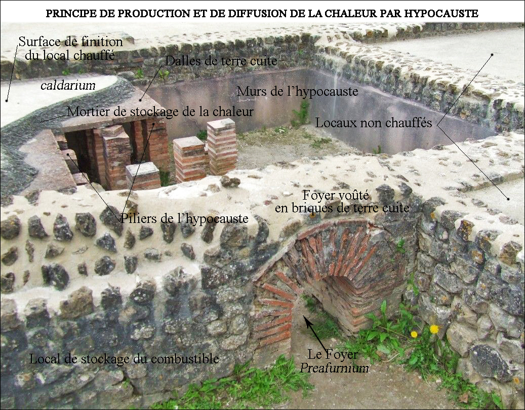 Maison au Grand Péristyle - Vieux-la-Romaine France. Principe de production et diffusion de la chaleur par hypocauste. Avec interprétation des différents locaux par l'auteur.